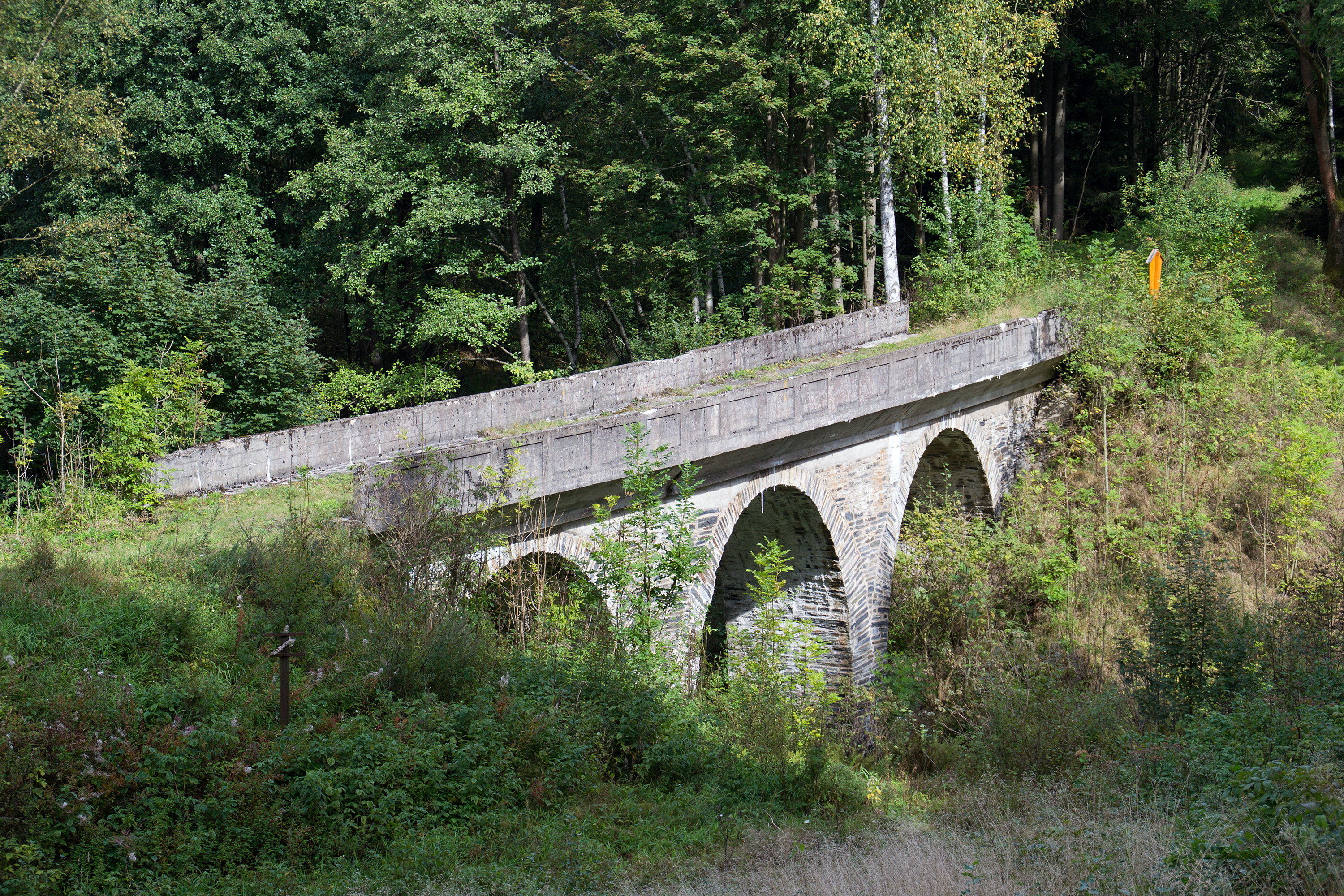 Ehemalige Eisenbahnbrücke der Bahnstrecke Ludwigsstadt–Lehesten an der Landesgrenze Bayern/Thüringen